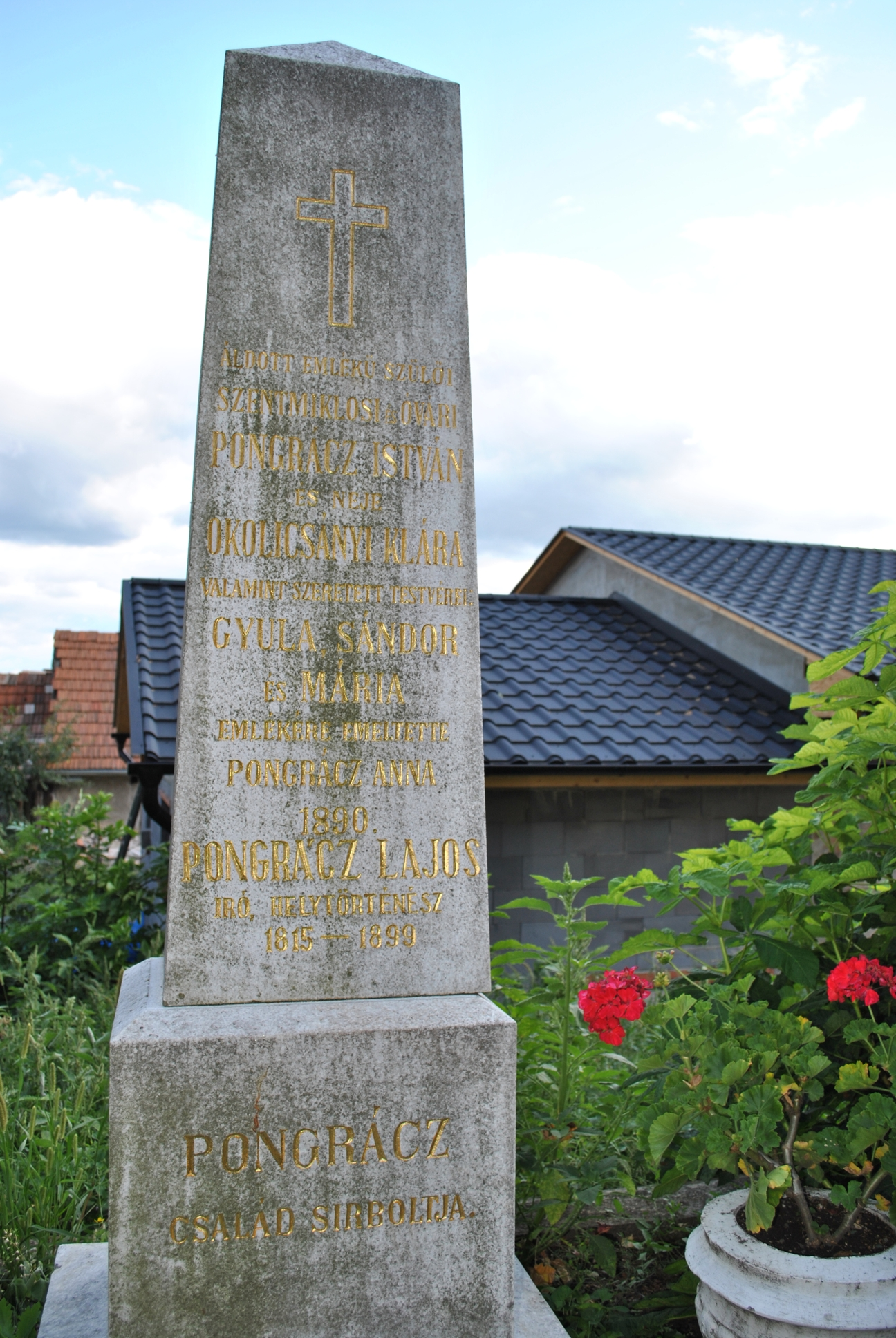 Felsőtúr, Pongrácz család sírja, emlékoszlop